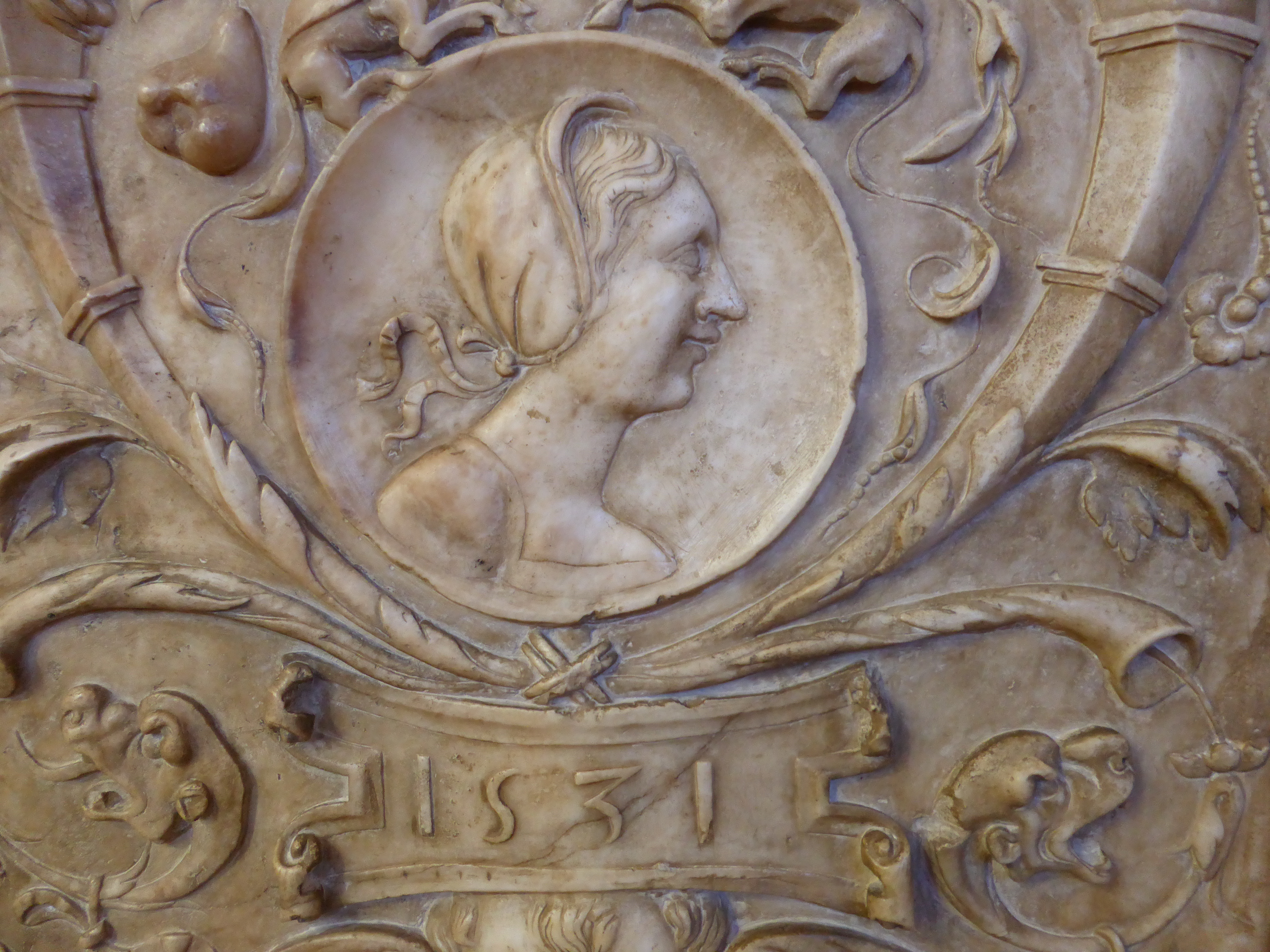 Retrato idealizado de Beatriz Galindo "La Latina", en su monumento funerario (cenotafio, o tumba vacía), del año 1531. Este sepulcro fue encargado y terminado en época de vida de Beatriz Galindo, tres o cuatro años antes de su muerte, que ocurrió en 1535. Este ejemplar de sepulcro renacentista fue instalado en el primer Monasterio de la Concepción Jerónima, de Madrid. Tras morir Beatriz Galindo, fue enterrada en la iglesia del monasterio, pero no en este sepulcro, sino en el coro alto. Actualmente este cenotafio se conserva en la iglesia del cuarto Monasterio de la Concepción Jerónima, en El Goloso, Madrid.